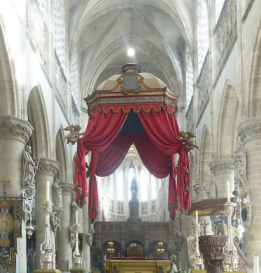 Processie pro Sanctus Gummarus Lyrmensis